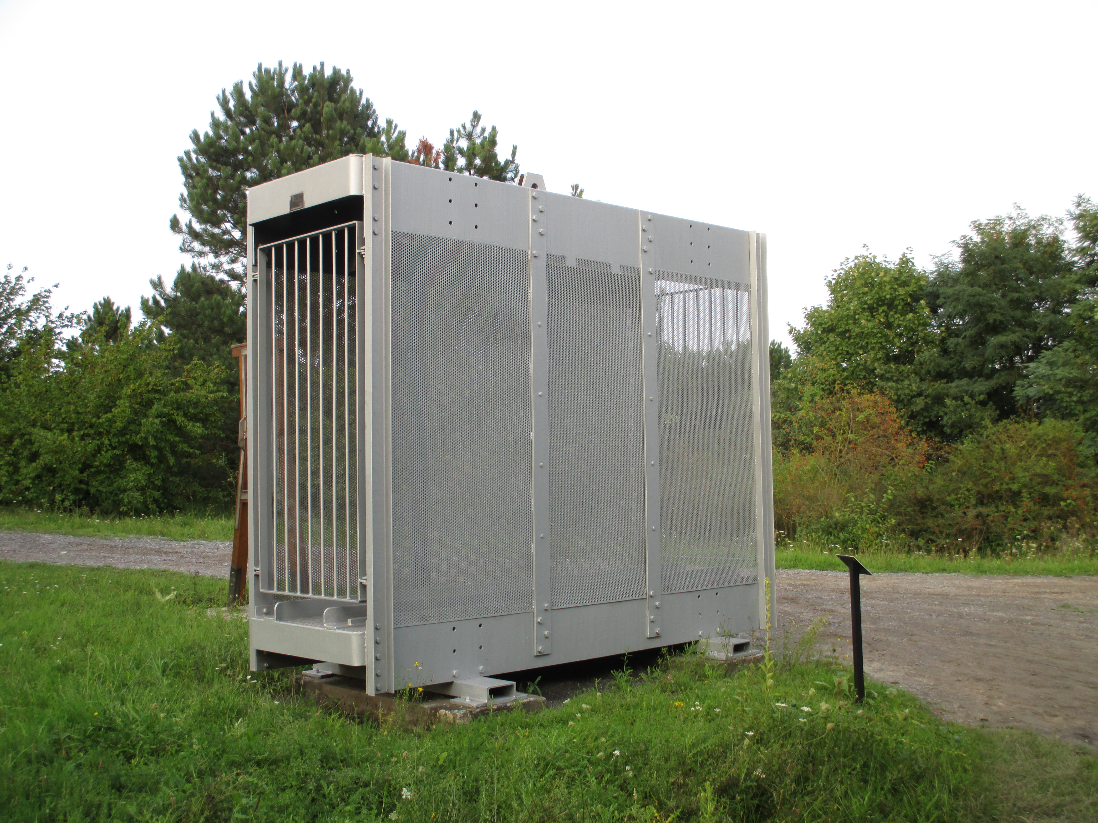 Station 9 des Bergbaukreuzweges an der Halde Haniel in Bottrop.